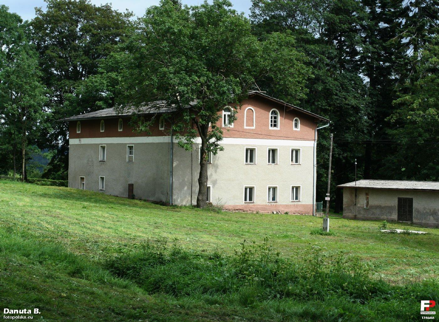 W porównaniu do zdjęcia sprzed roku widać, że uporządkowano zieleń .